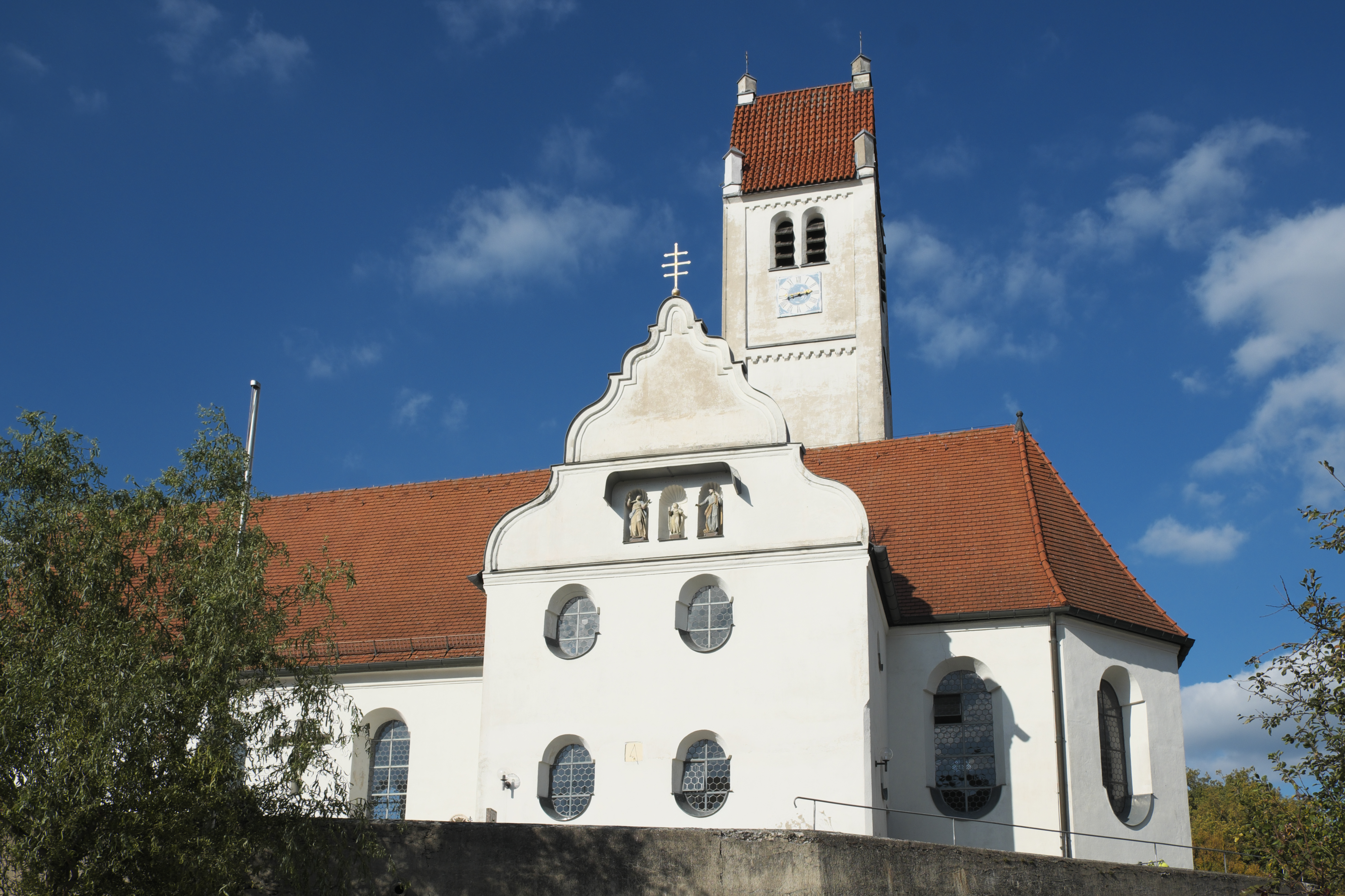 Katholische Pfarr- und Wallfahrtskirche Heilig Kreuz in Kreuzholzhausen (Bergkirchen) im Landkreis Dachau (Bayern/Deutschland)